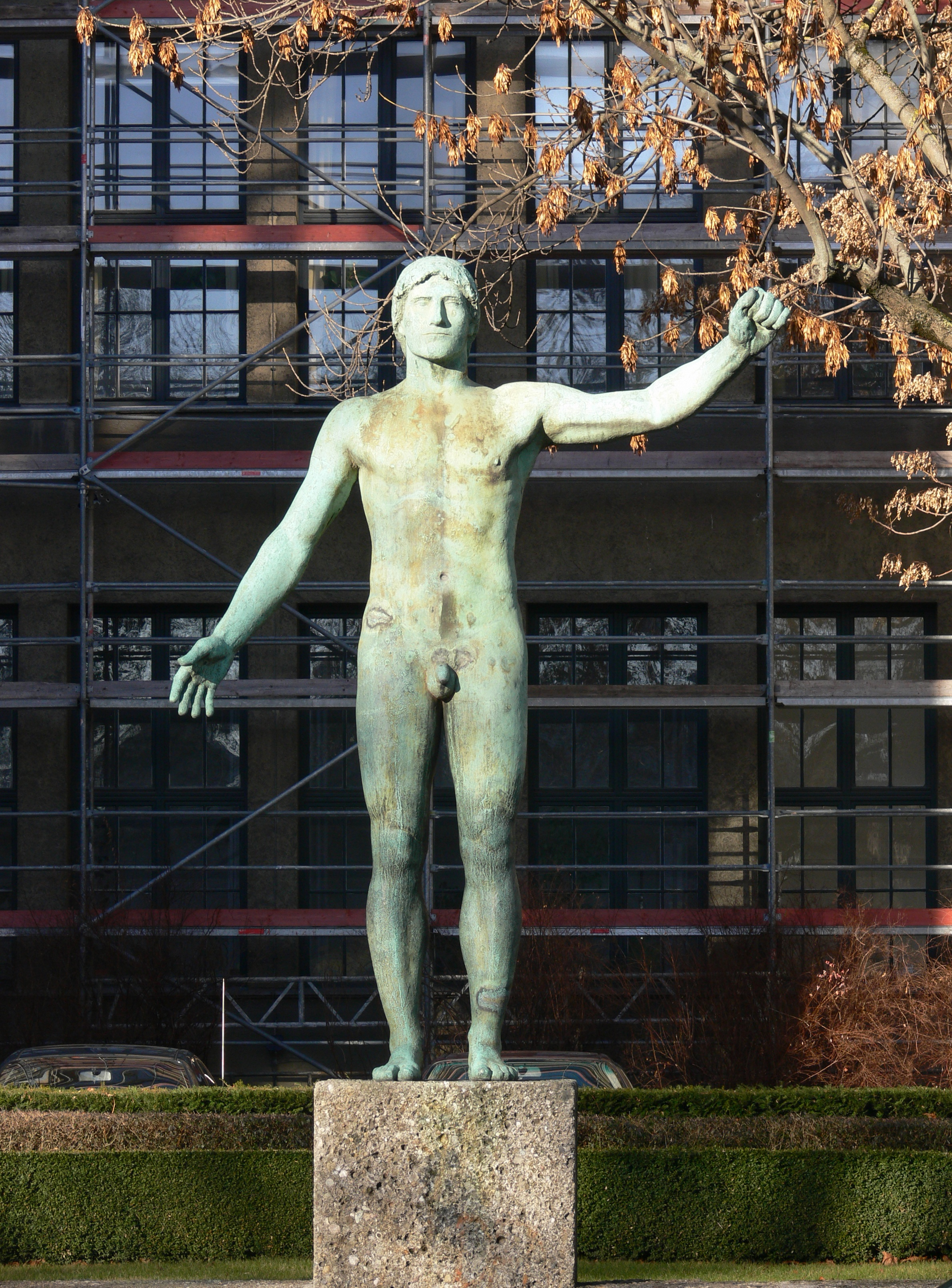 München, Arcisstraße, Rossebändiger von Bernhard Bleeker - 1931 (als Einzelfigur ohne Pferd aufgestellt) vor der Technischen Universität